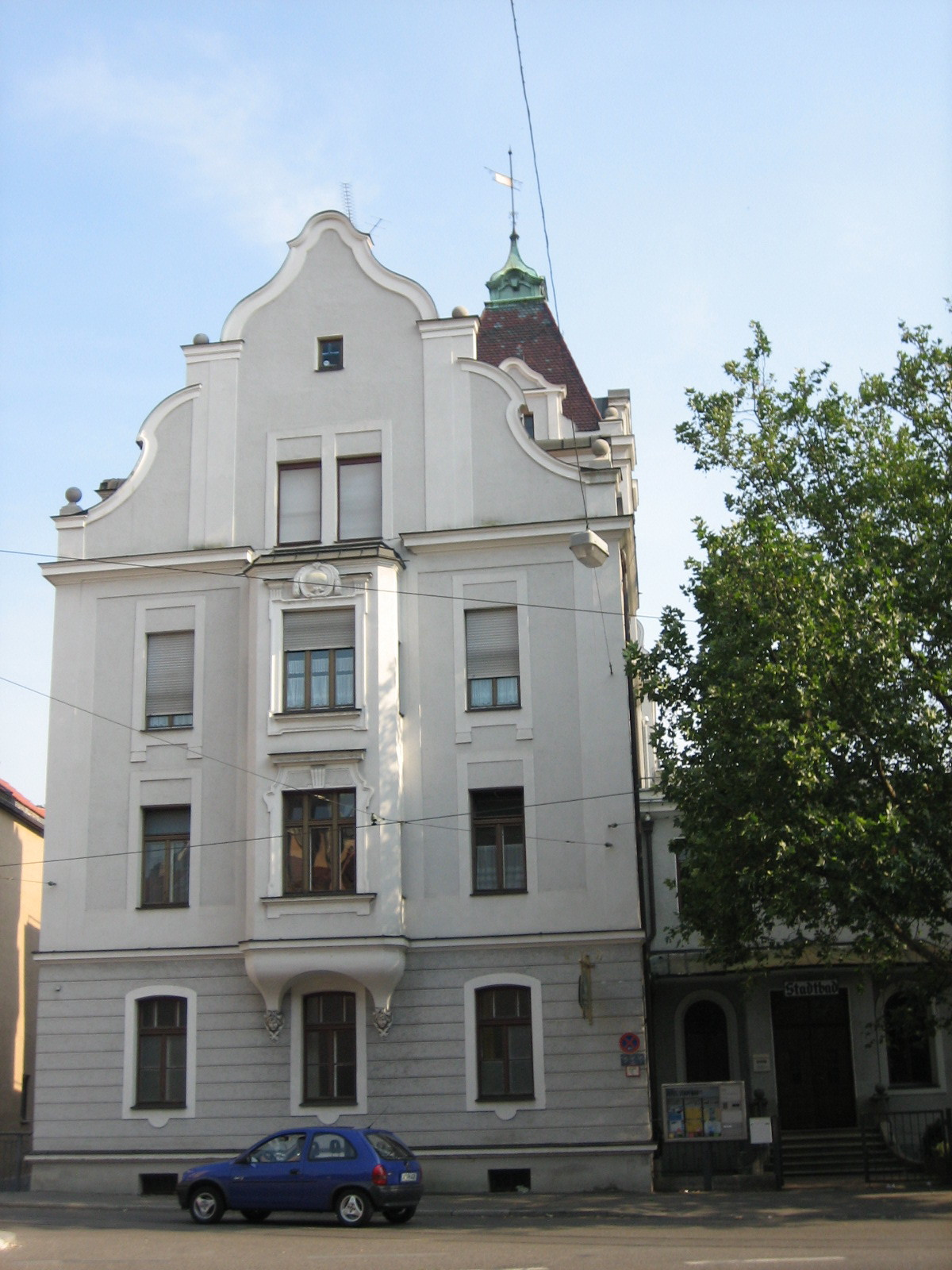 Altes Stadtbad in Augsburg, Südseite, Haupteingang am Leonhardsberg